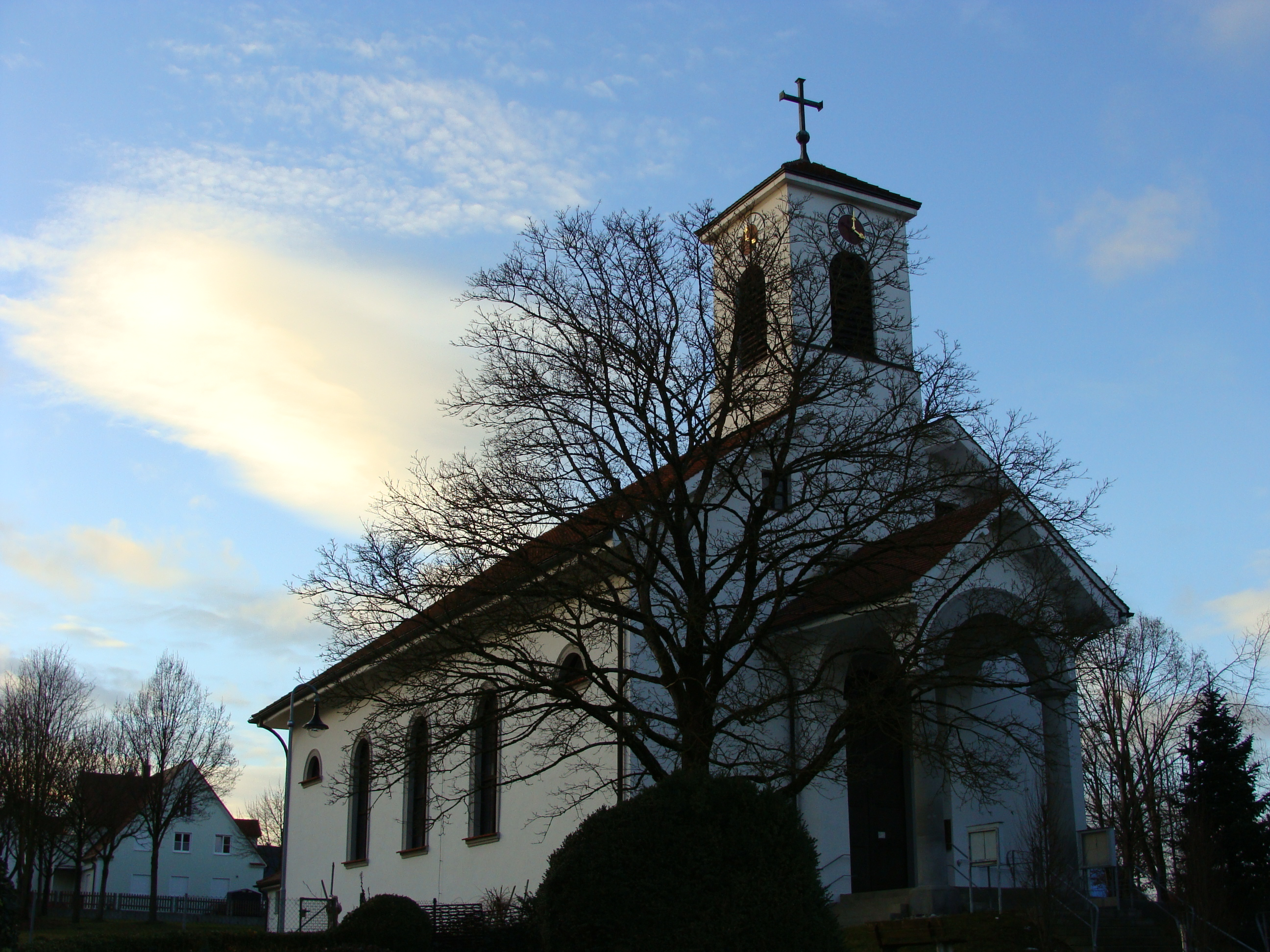 Katholische Pfarrkirche St. Georg